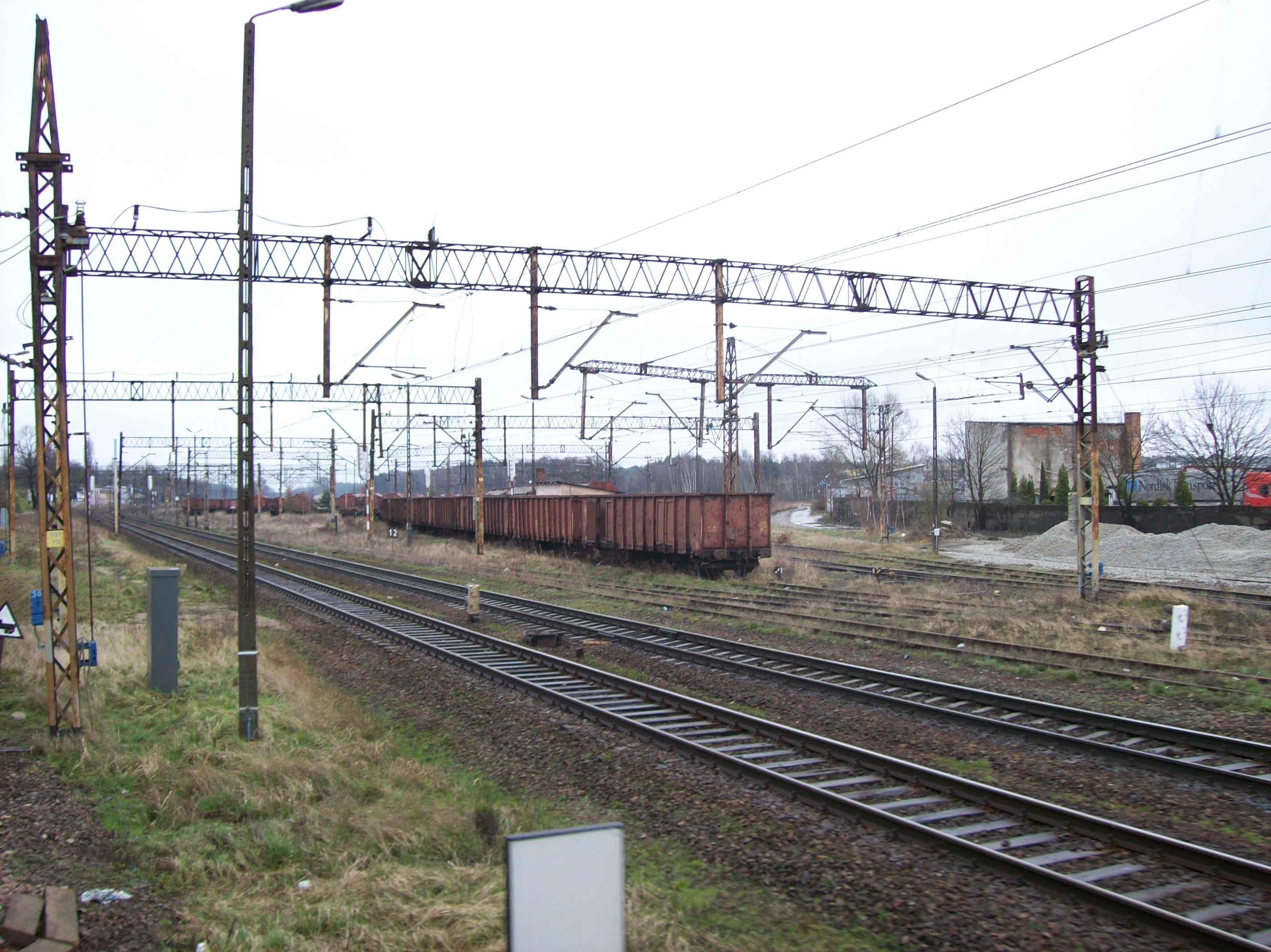 Linia kolejowa 351 okolice Szczecin Dąbia